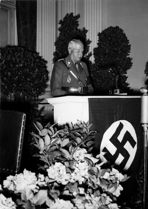 Juwelier-Kongress, Karl-Eduard von Sachsen-Coburg und Gotha Festakt in der Akademie der Künste zur Eröffnung des 5. Internationalen Juwelier Kongresses 1935. Ehrenpräsident Herzog Carl-Eduard von Sachsen-Coburg und Gotha bei der Eröffnungsrede. Abgebildete Personen: Sachsen-Coburg und Gotha, Karl-Eduard von: 1884-1954, Herzog, Präsident des Deutschen Roten Kreuzes, Deutschland